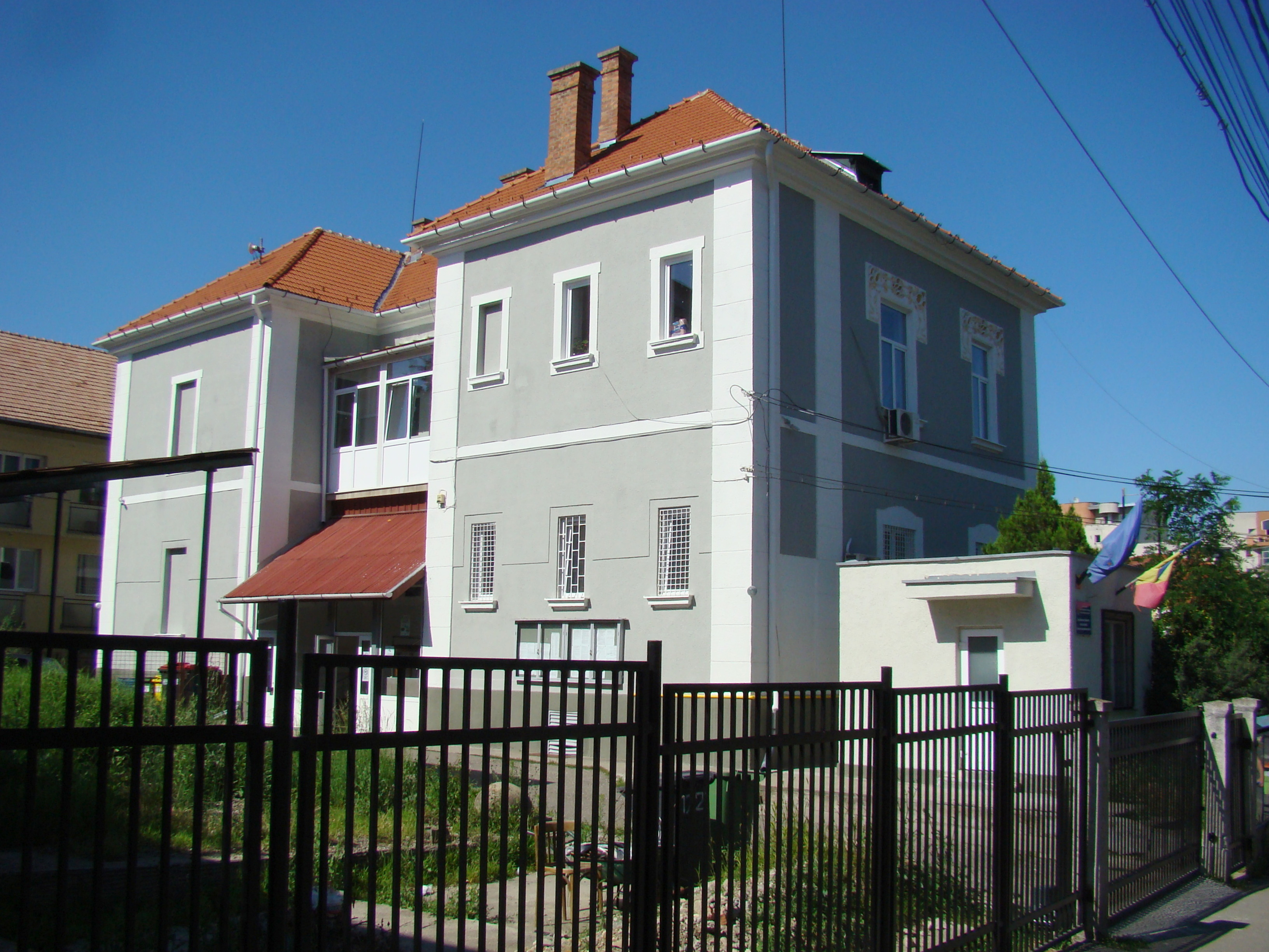 Clădire monument istoric, str.Andrei Mureșanu, nr.16 (în prezent Serviciul de pașapoarte)